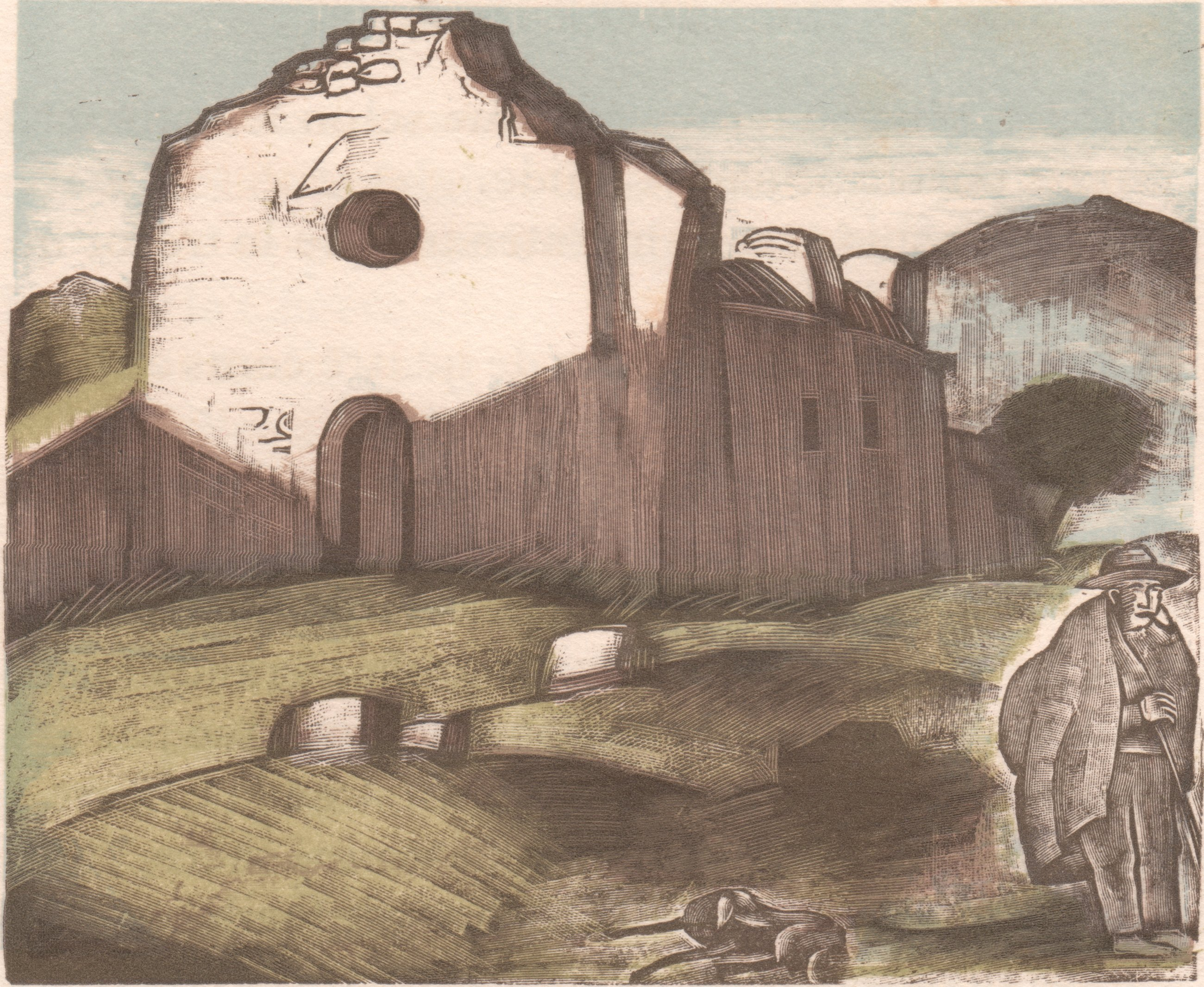 Illustration p 101 de La chèvre d'or de Paul Arène, compositions en couleur de Siméon, édition d'art Manuel Brucker, Paris.